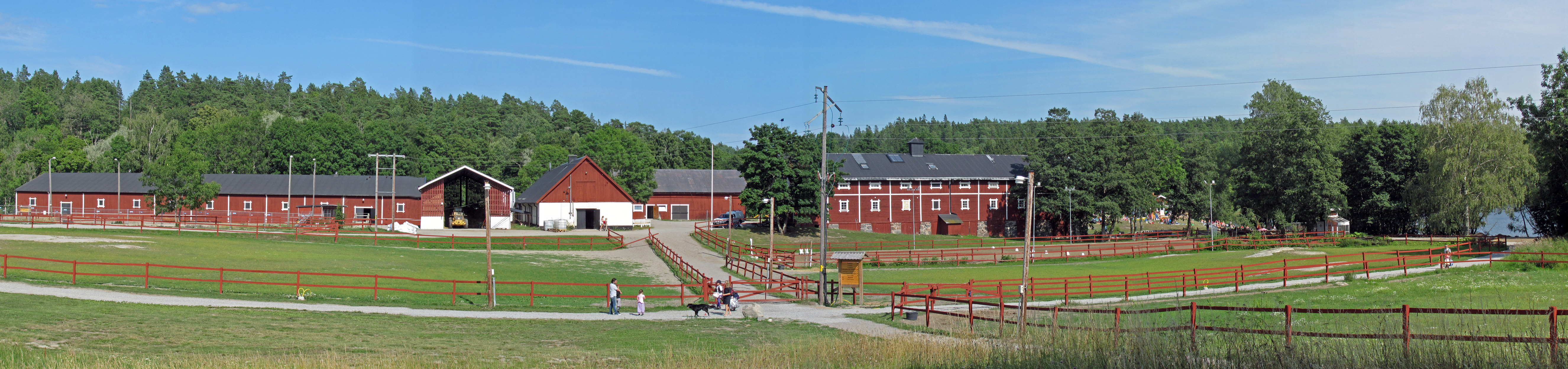 Velamsund